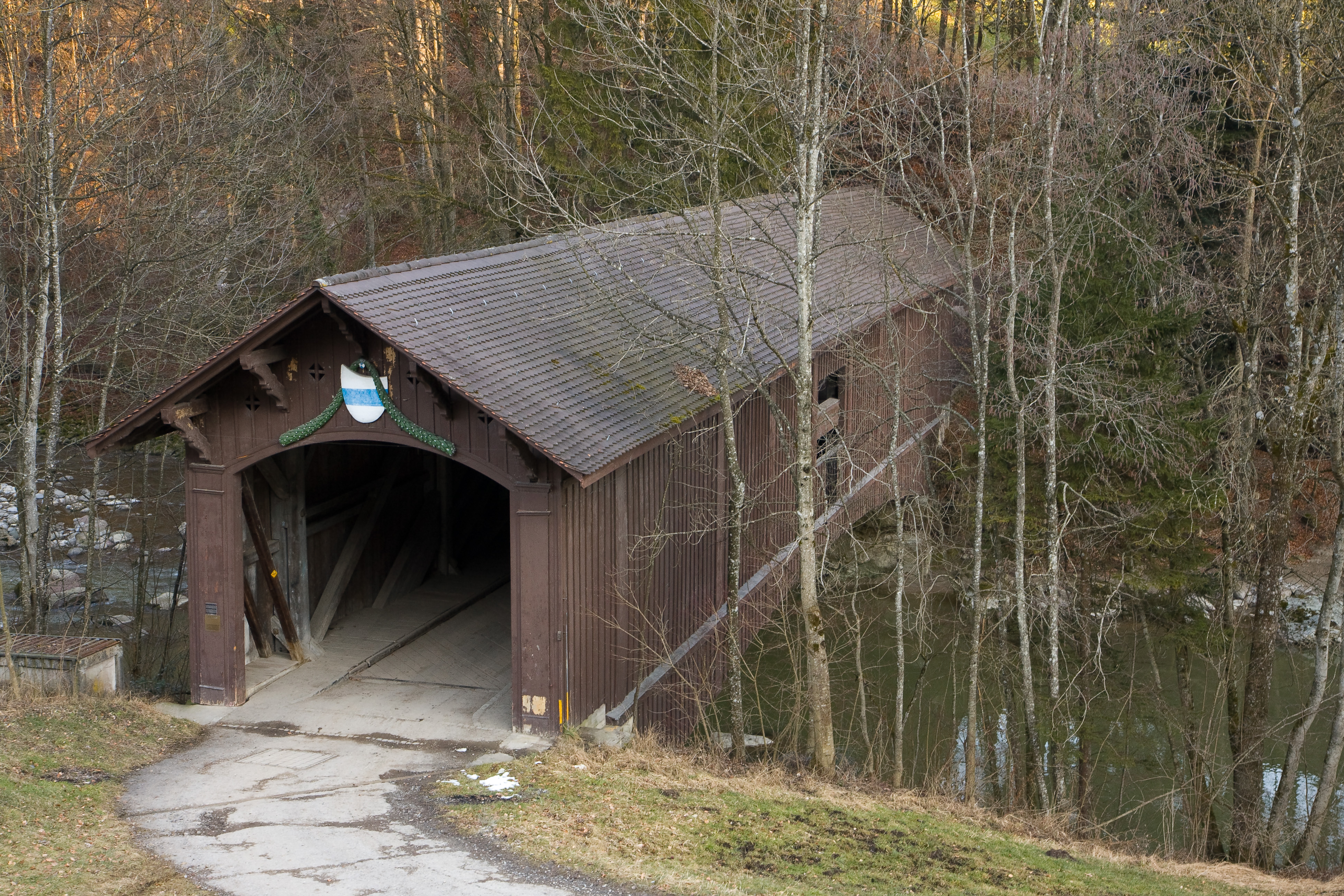 Die «Babenwaag» in Sihlbrugg vom Zuger Ufer (Gemeinde Neuheim) gesehenerbaut 1847 nach Plänen von Ferdinand StadlerDie Babenwaag war die Verbindungsbrücke zwischen Zürich und Zug, bis sie 1960 durch eine leistungsfähigere Betonbrücke ersetzt wurde. Die Holzbrücke wurde sihlaufwärts verschoben.